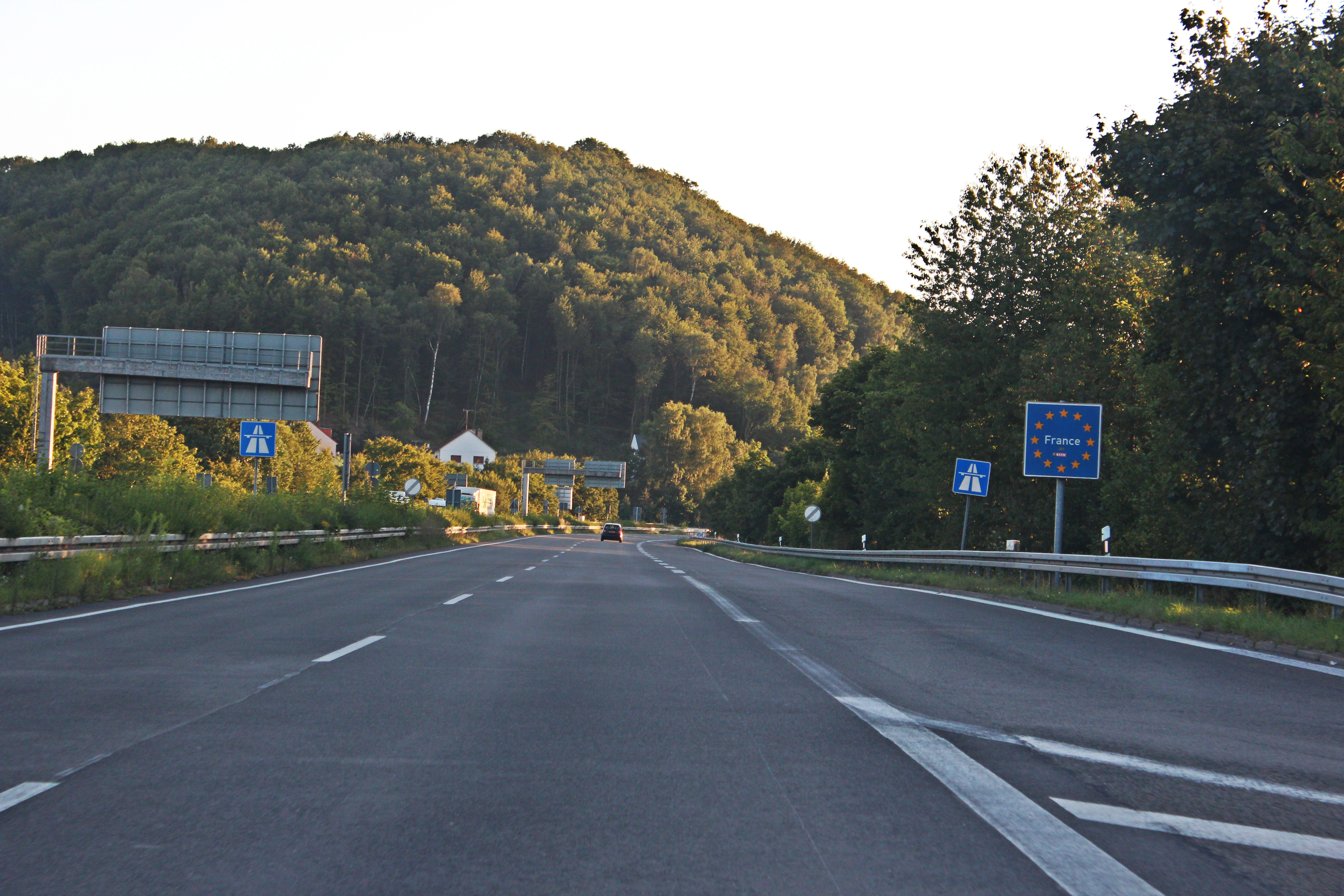 Fin de Autoroute A6 - frontiere francaise